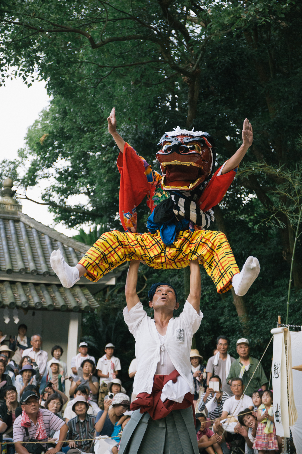 伊勢大神楽講社の獅子舞 放下芸『魁曲』